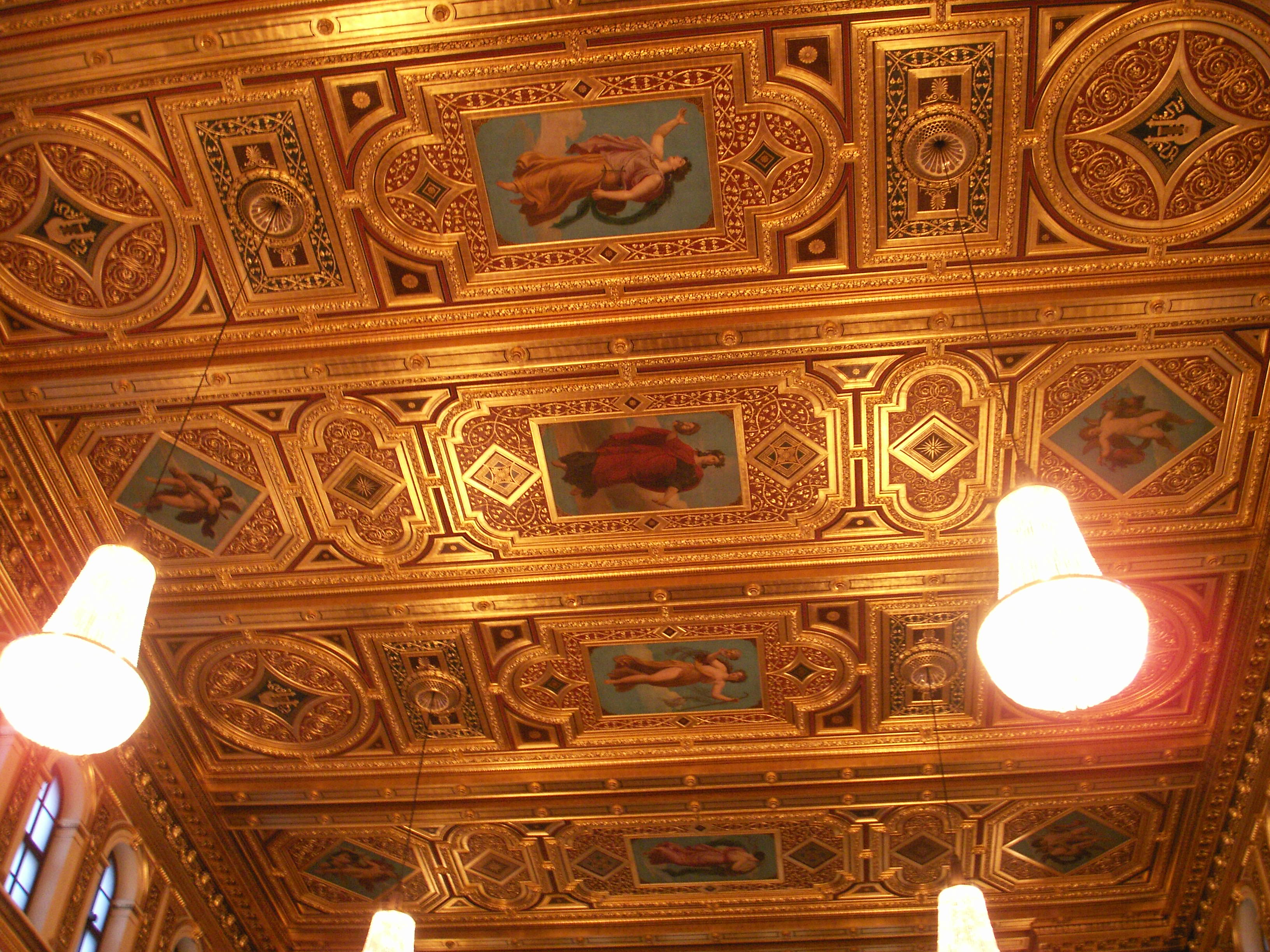 Musikverein Wien, Großer Saal, Decke